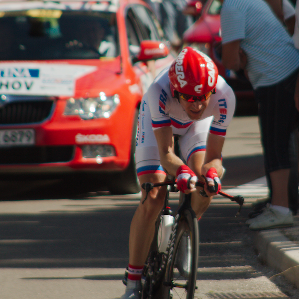 MENCHOV Denis